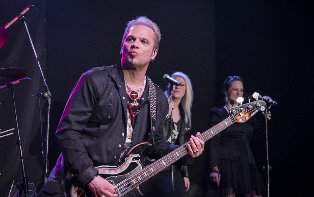 A Banda de Metal Sinfônico Therion apresenta-se em São Paulo, Brasil.